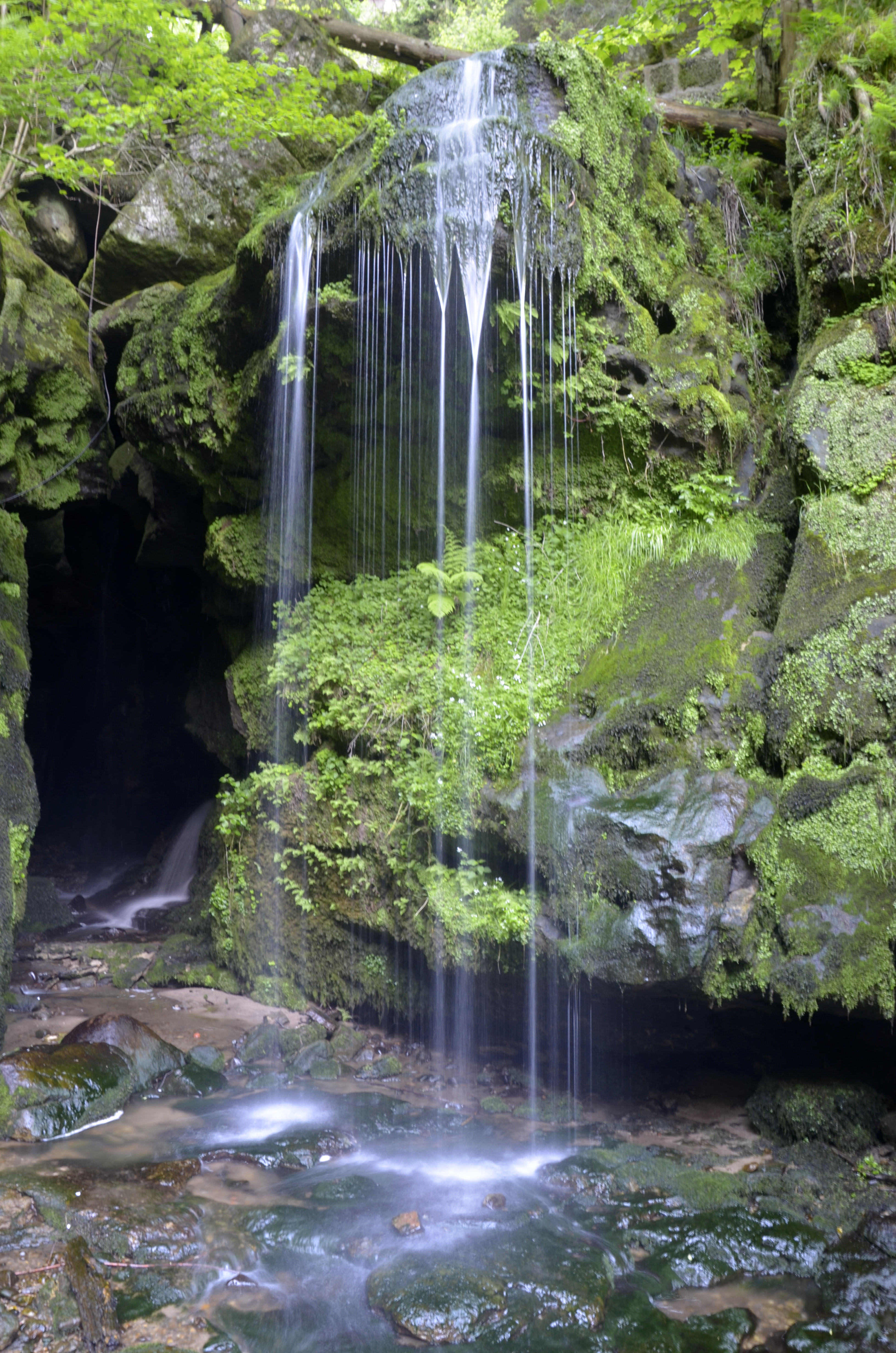 Abendliches Tröpfeln am Amselfall bei Rathen in der Sächsischen Schweiz